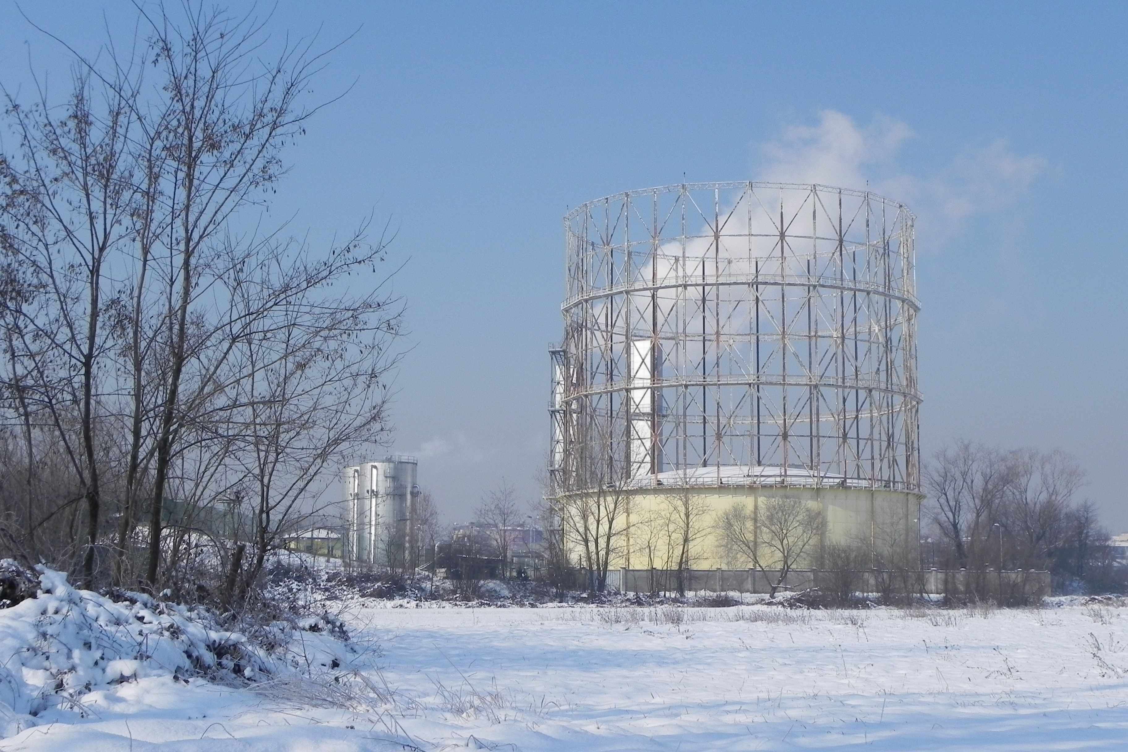 Milano, il vecchio gasometro di Cavriano.